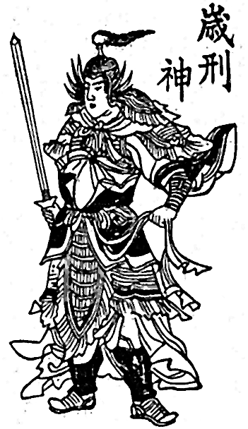 God of Saikei. 歳刑神